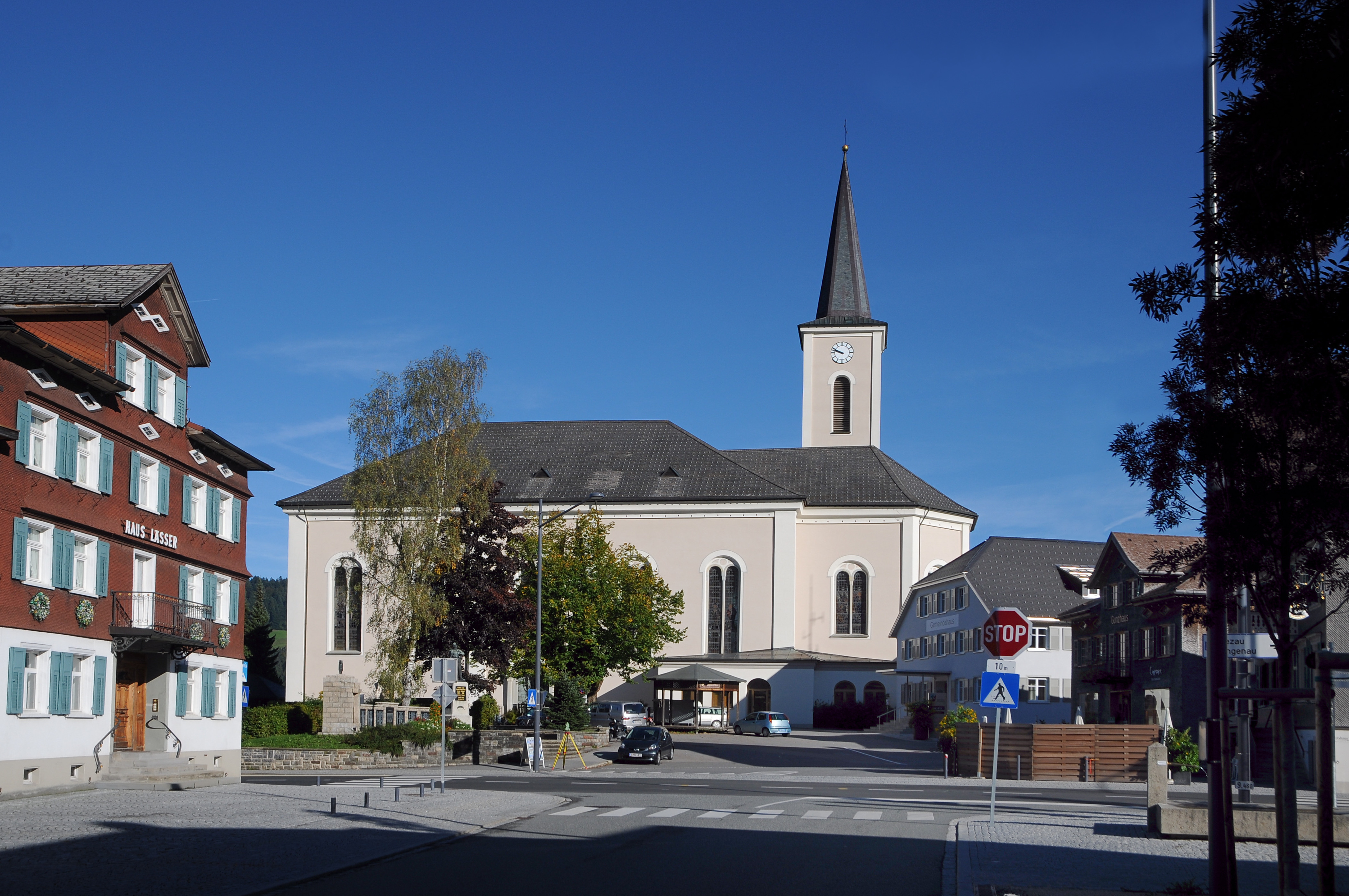 Kath. Pfarrkirche hl. Martin in Hof, Alberschwende.